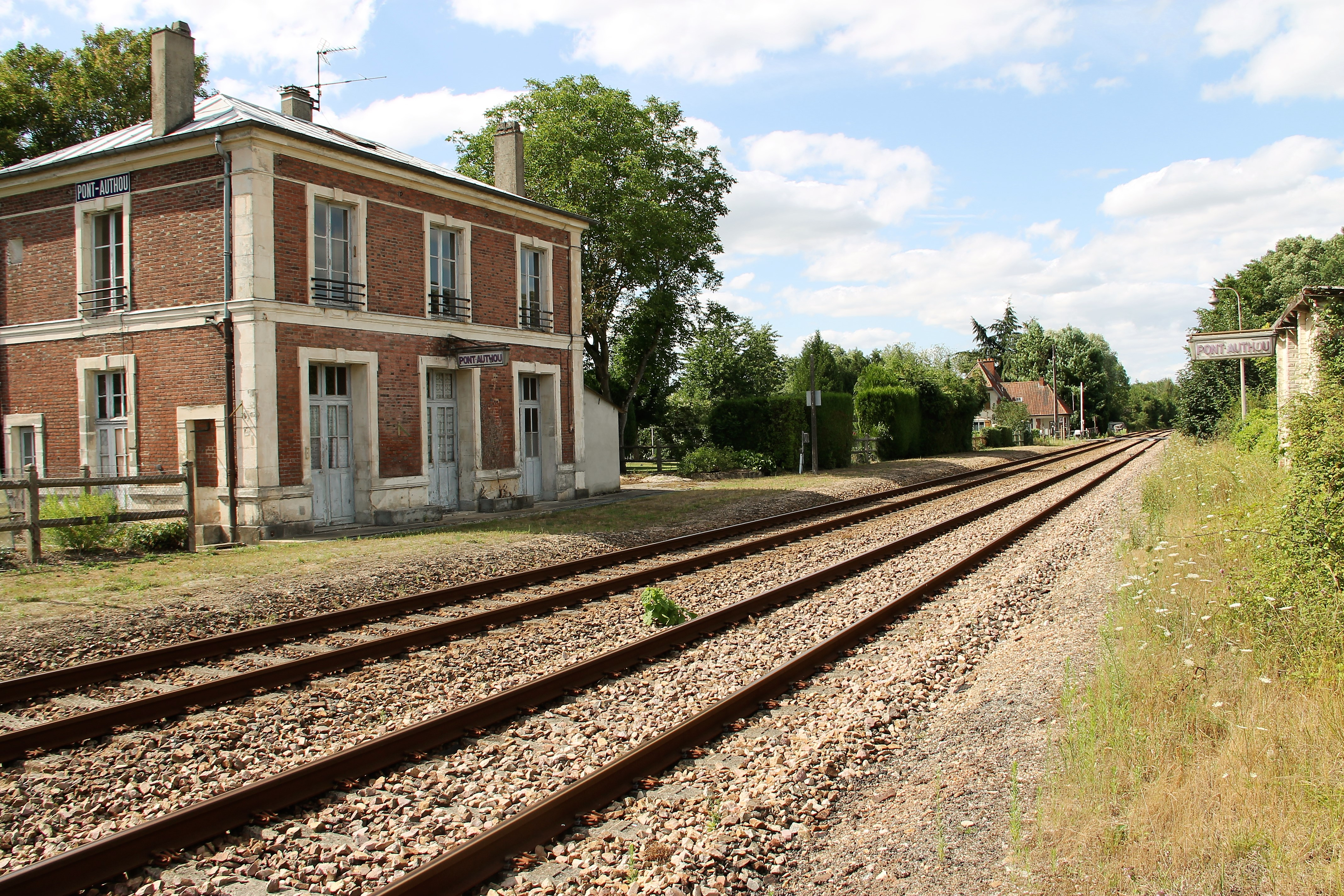 Le bâtiment voyageurs en 2018.